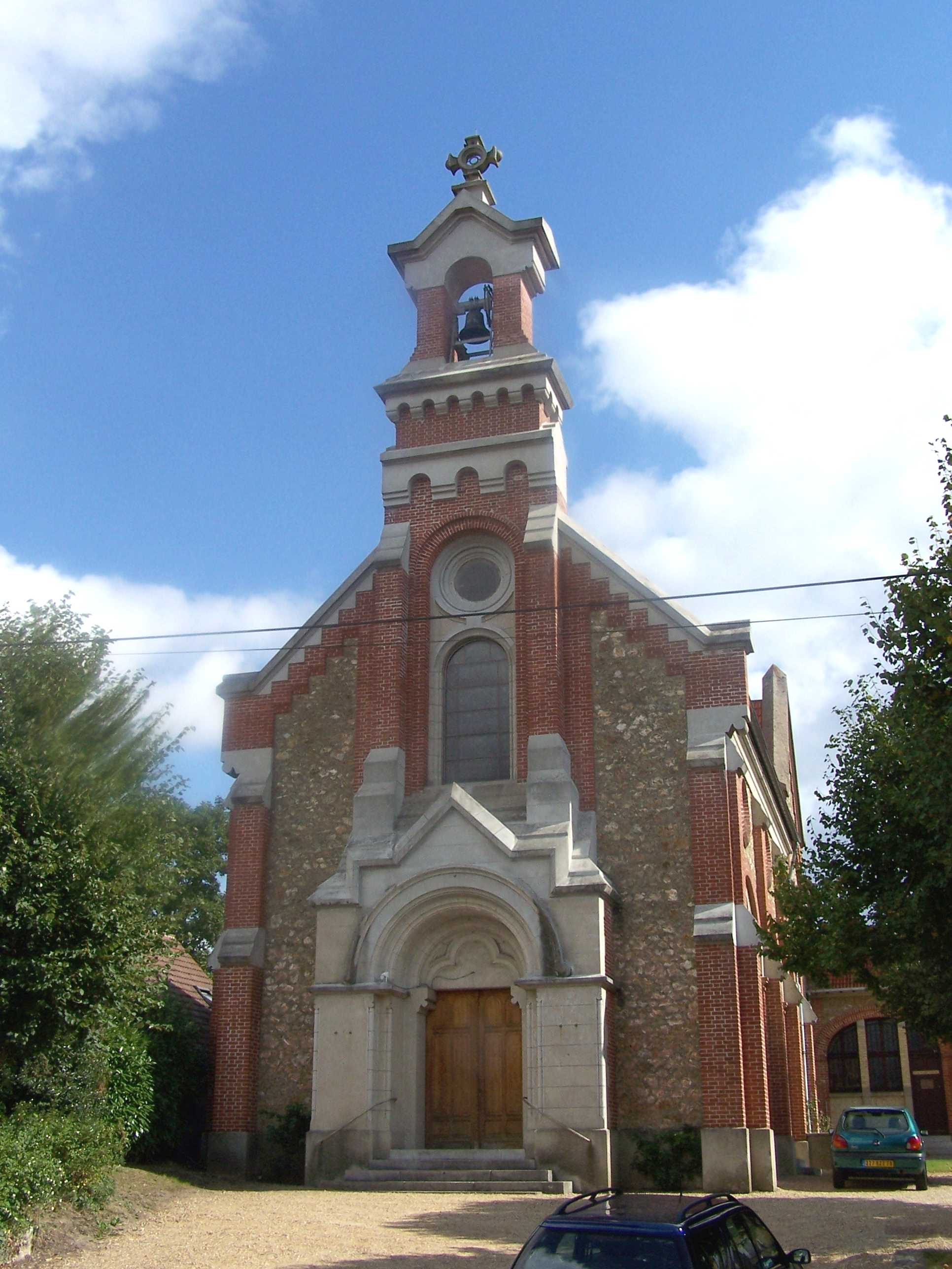 Église Saint-Lin de Jouars-Pontchartrain (Yvelines, France)